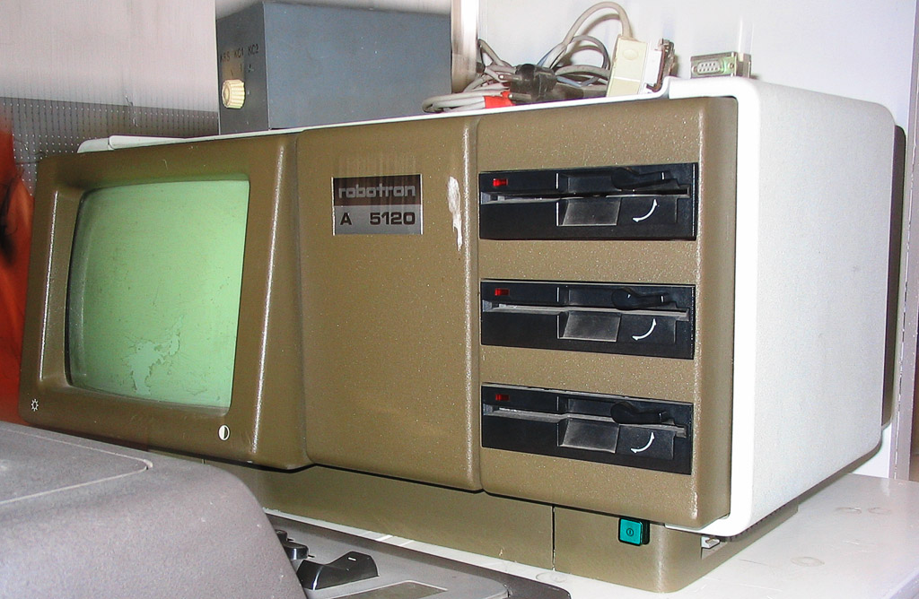 Beschreibung: Robotron A 5120 Fotograf: Darkone, 15. Mai 2005